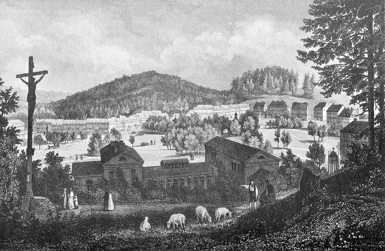 heute Mariánské Lázně in Tschechien